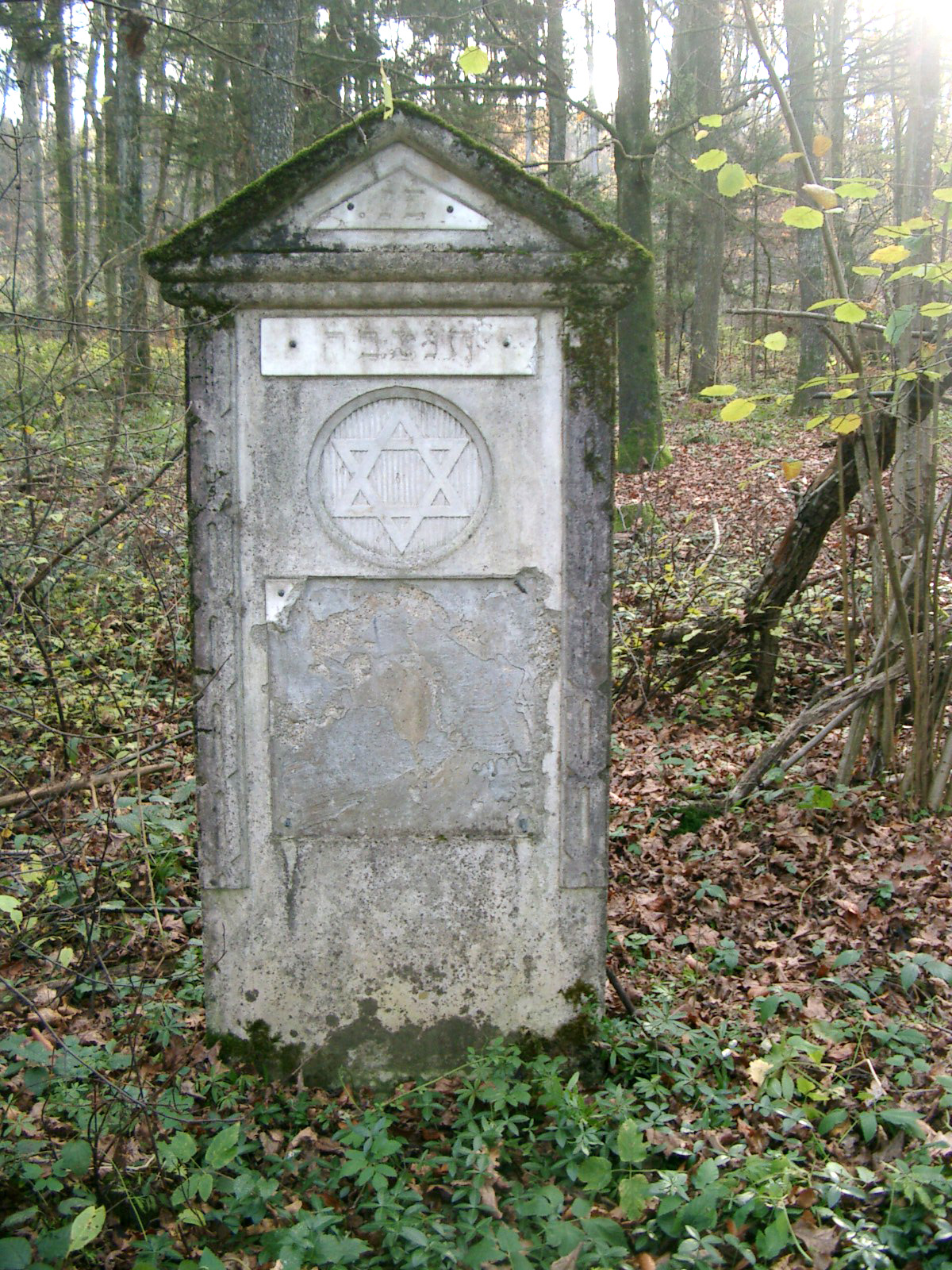 Arbeitslager Seinberg bei Feldbach 1. Weltkrieg, jüdischer Grabstein - Rest des Friedhofs